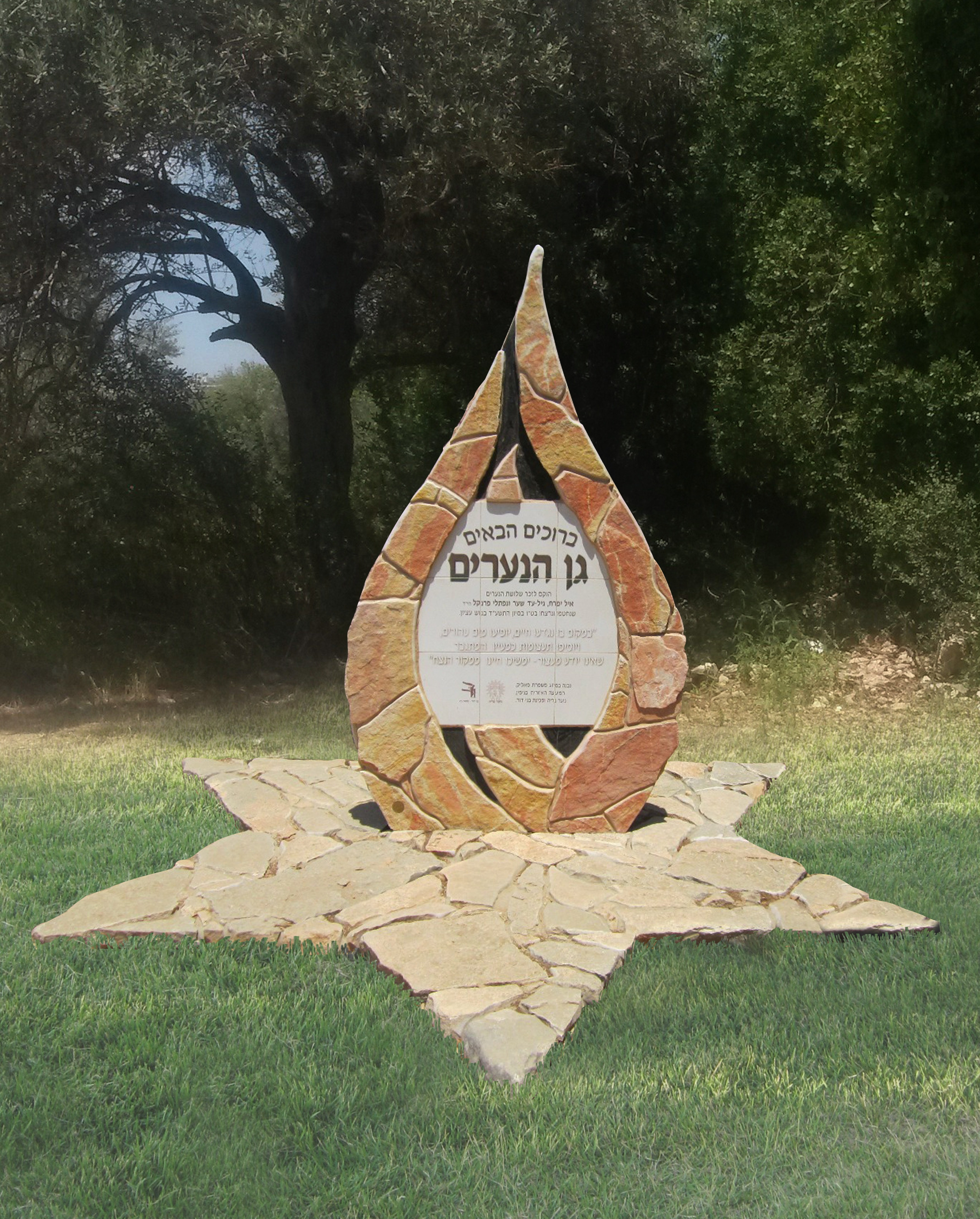 אנדרטת שלושת הנערים האמן אסף קדרון